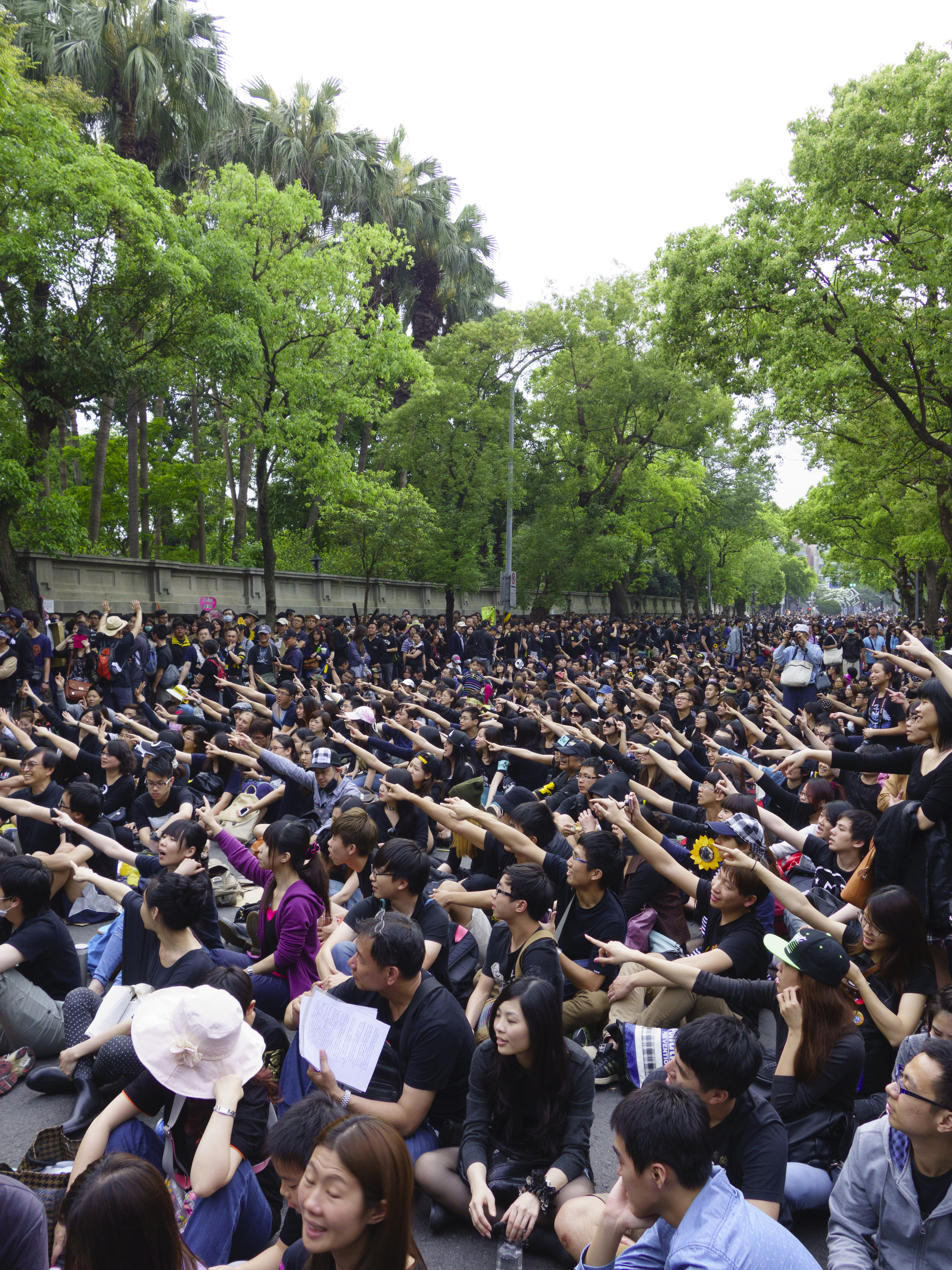 DSC00444 2014 太陽花學運與反服貿遊行